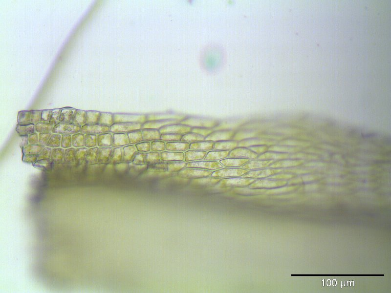 Weißes Kurzbüchsenmoos (Brachythecium albicans), Blattflügelzellen, Vergrößerung: 250x